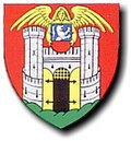 Coat of arms of Kirchschlag in der Buckligen Welt, Austria